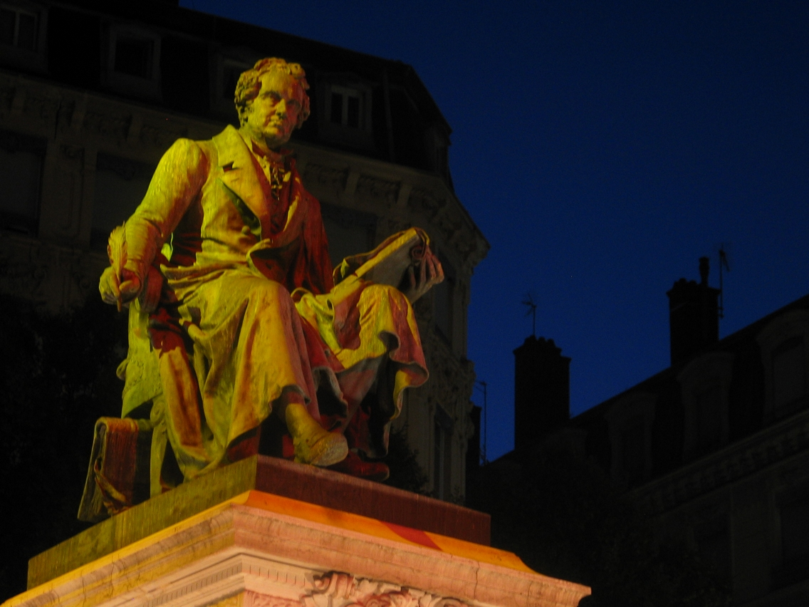 La statue d'Ampère sur la place qui porte son nom dans le IIe arrondissement de Lyon